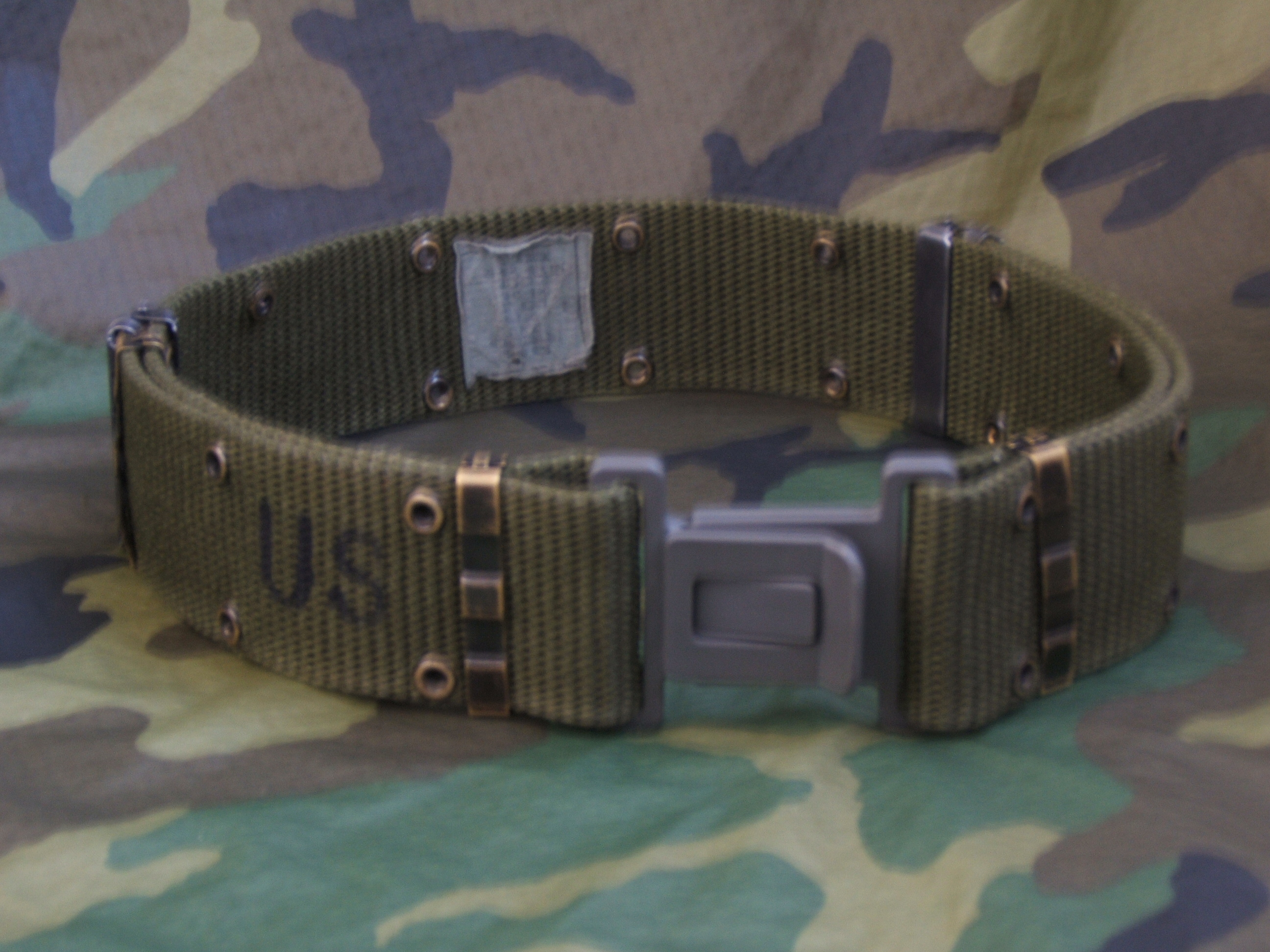 Indywidualny pas oporządzenia ALICE